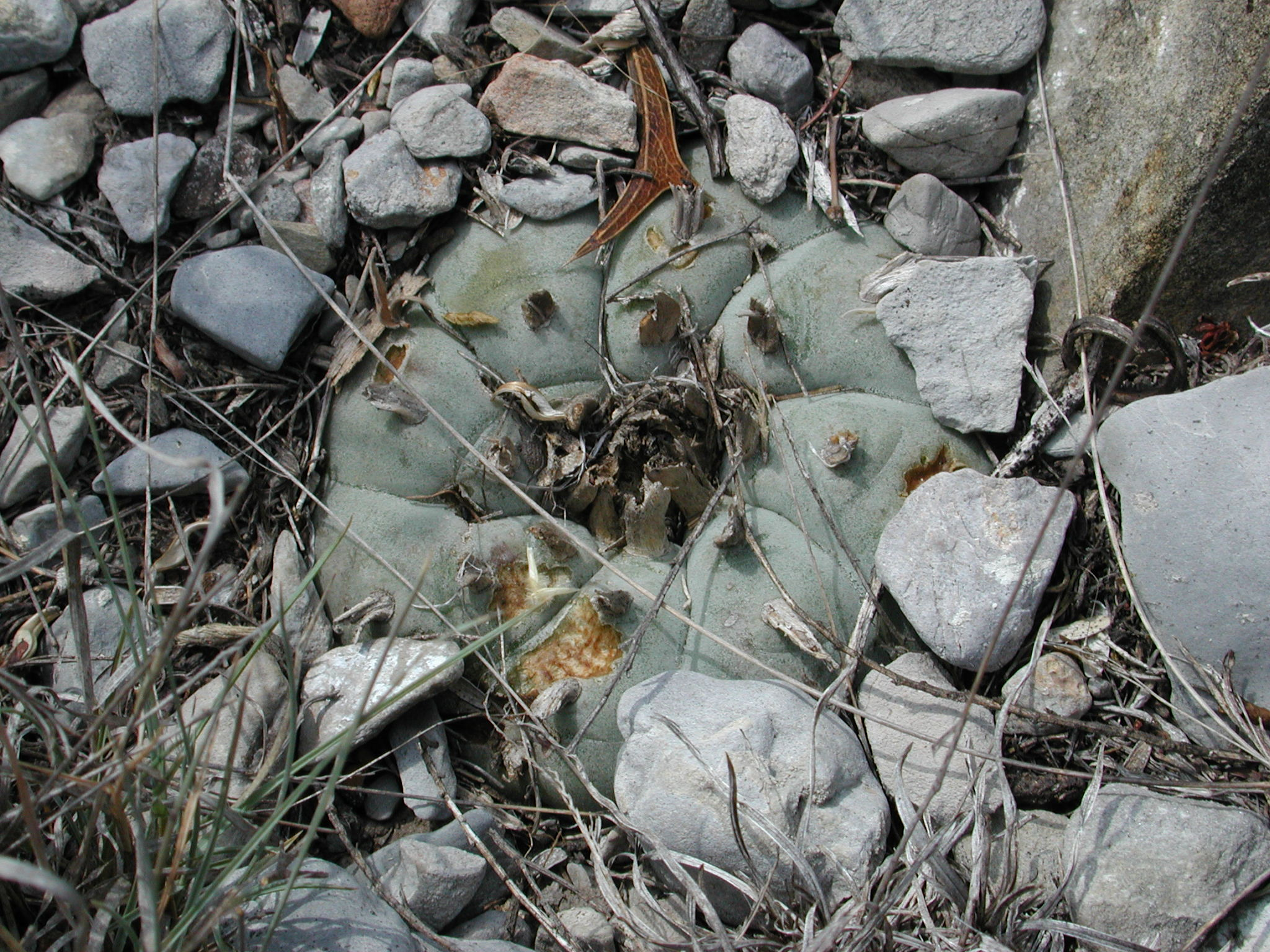 Lophophora williamsii near Monterrey, Nuevo León, México.